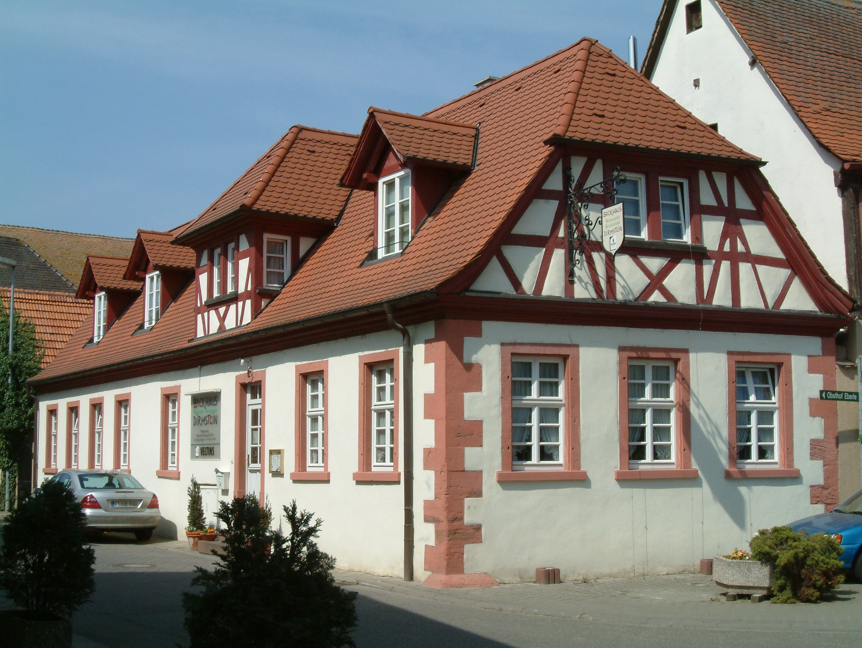 Backhaus zu Dirmstein, selbst fotografiert am 2006-04-24 und freigegeben durch Benutzer:Mundartpoet